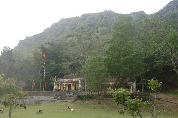 Đền thờ Mai An Tiêm thuộc xã Nga Phú - huyện Nga Sơn - Thanh Hóa - Việt Nam (Mai An Tiem temple - Nga Son district - Thanh Hoa province - Vietnam)